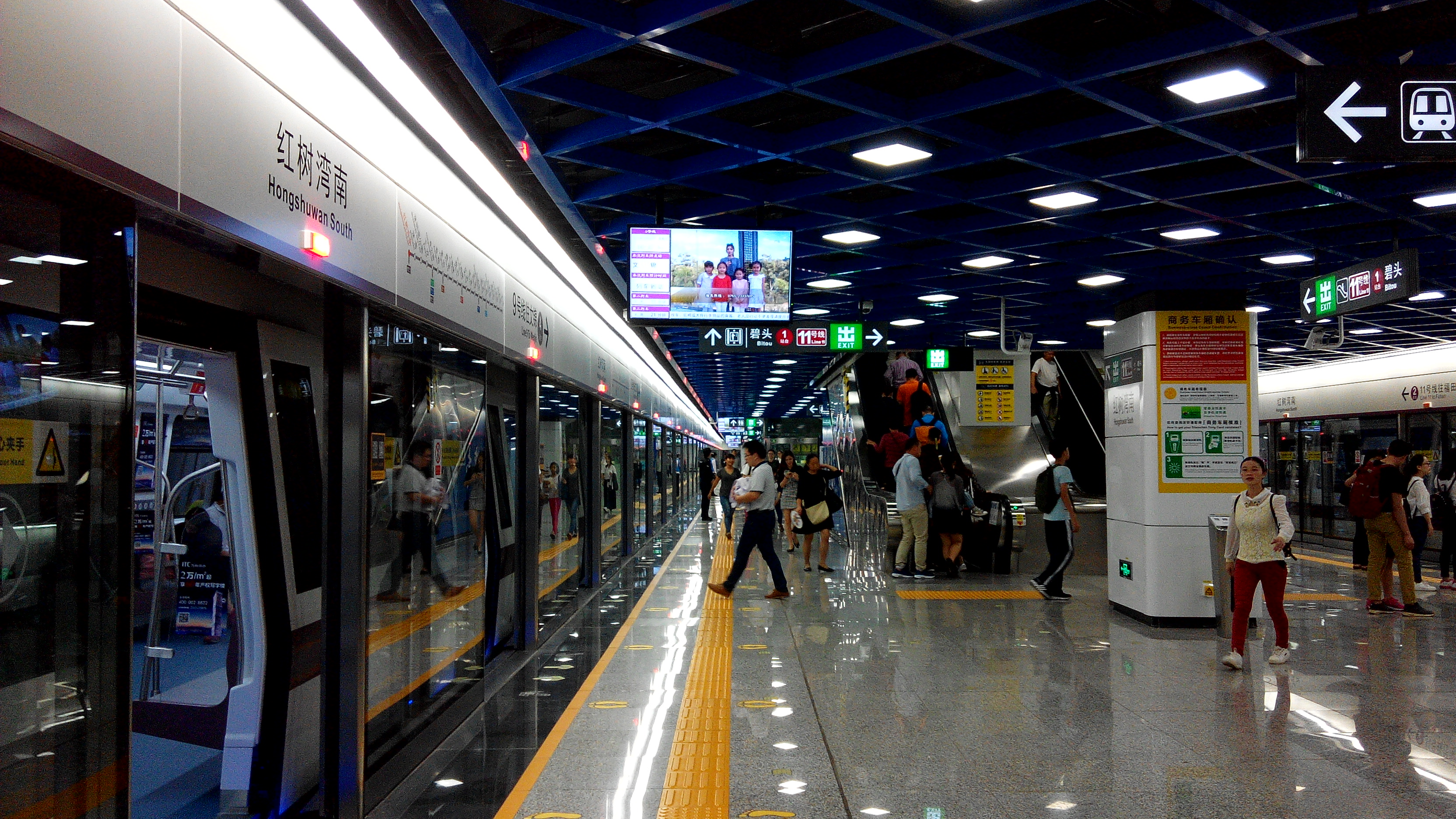 深圳地铁9号线 红树湾站4号站台